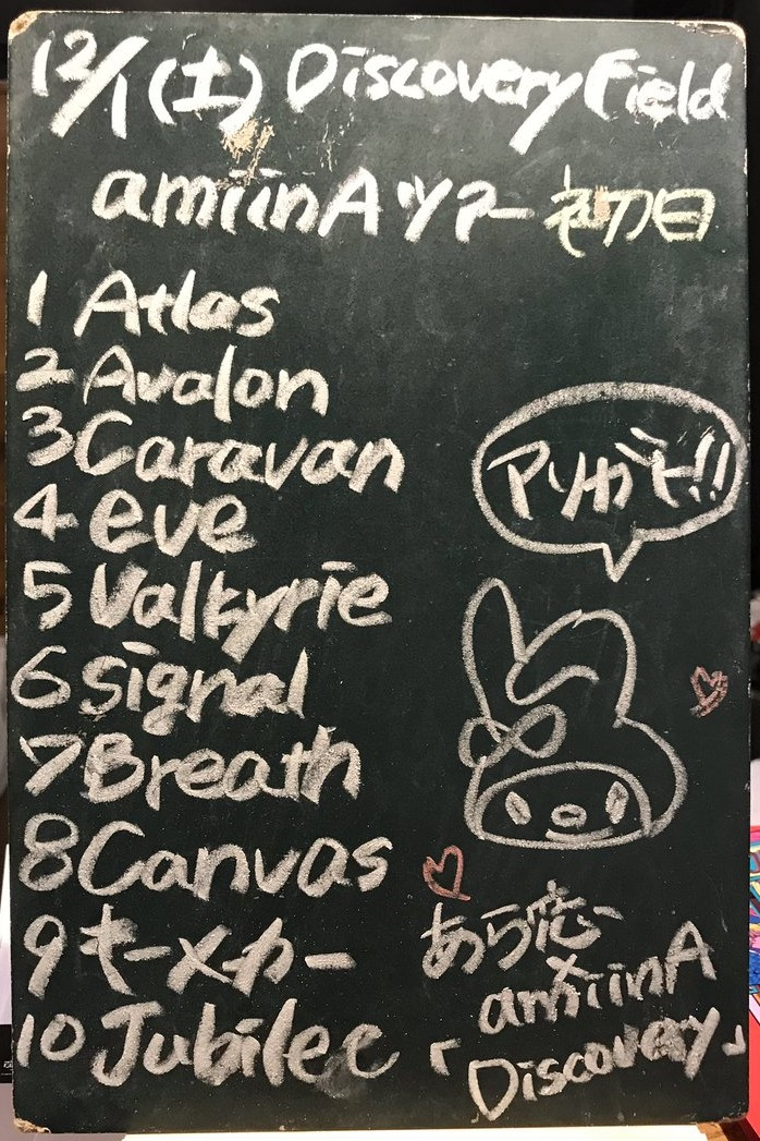 amiinAセトリボード(20181201(1))